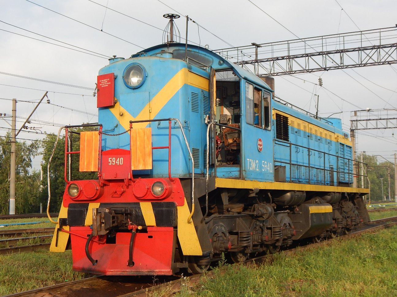 С завода поступил в депо Ульяновск (11.1978 г.) КР-2 Уфимский ТРЗ 05.1999 г. КР Астраханский ТРЗ 11.2009 г. СР Астраханский ТРЗ 11.2016 г.